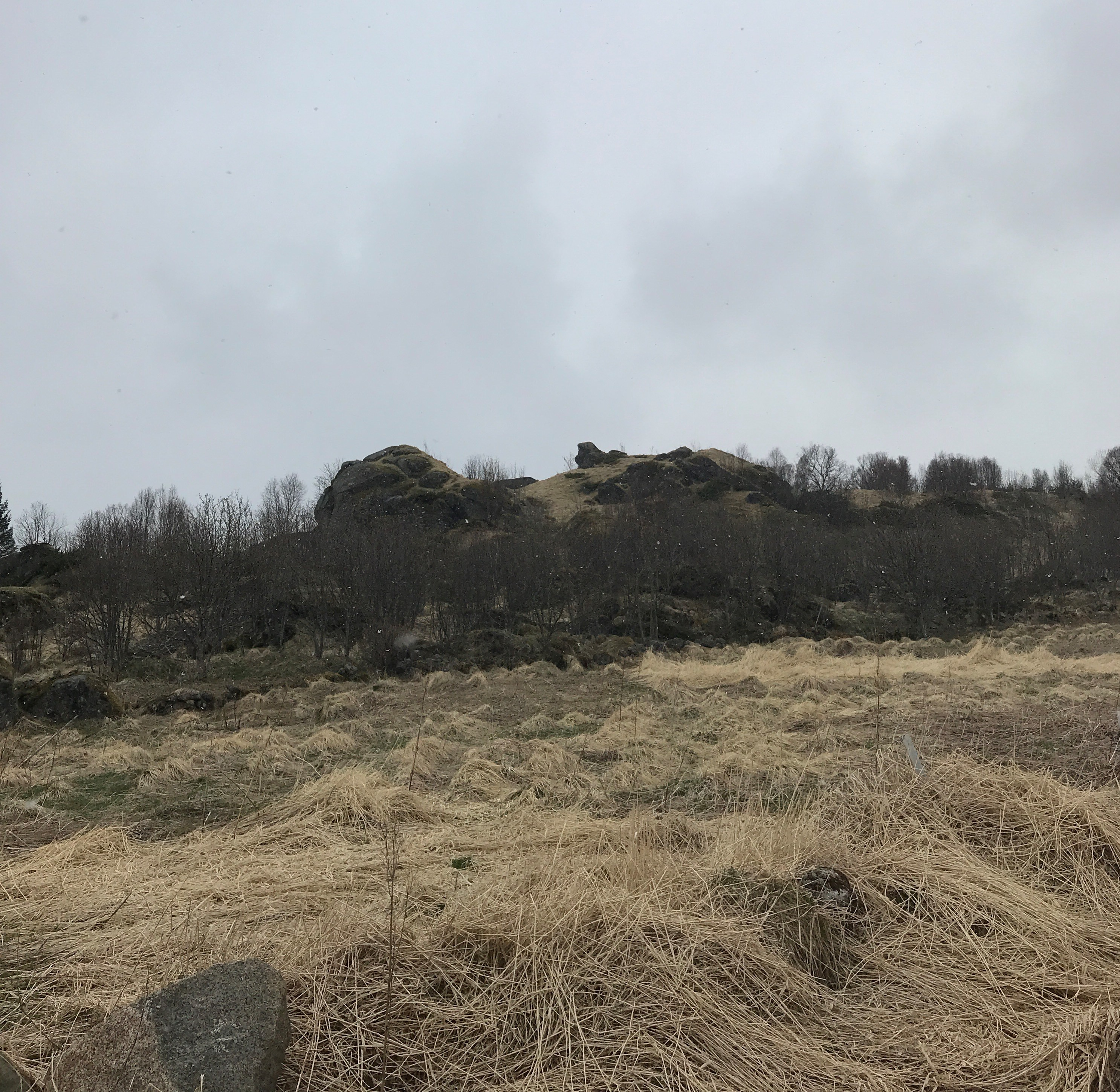 SkallanKallsnesVakkert